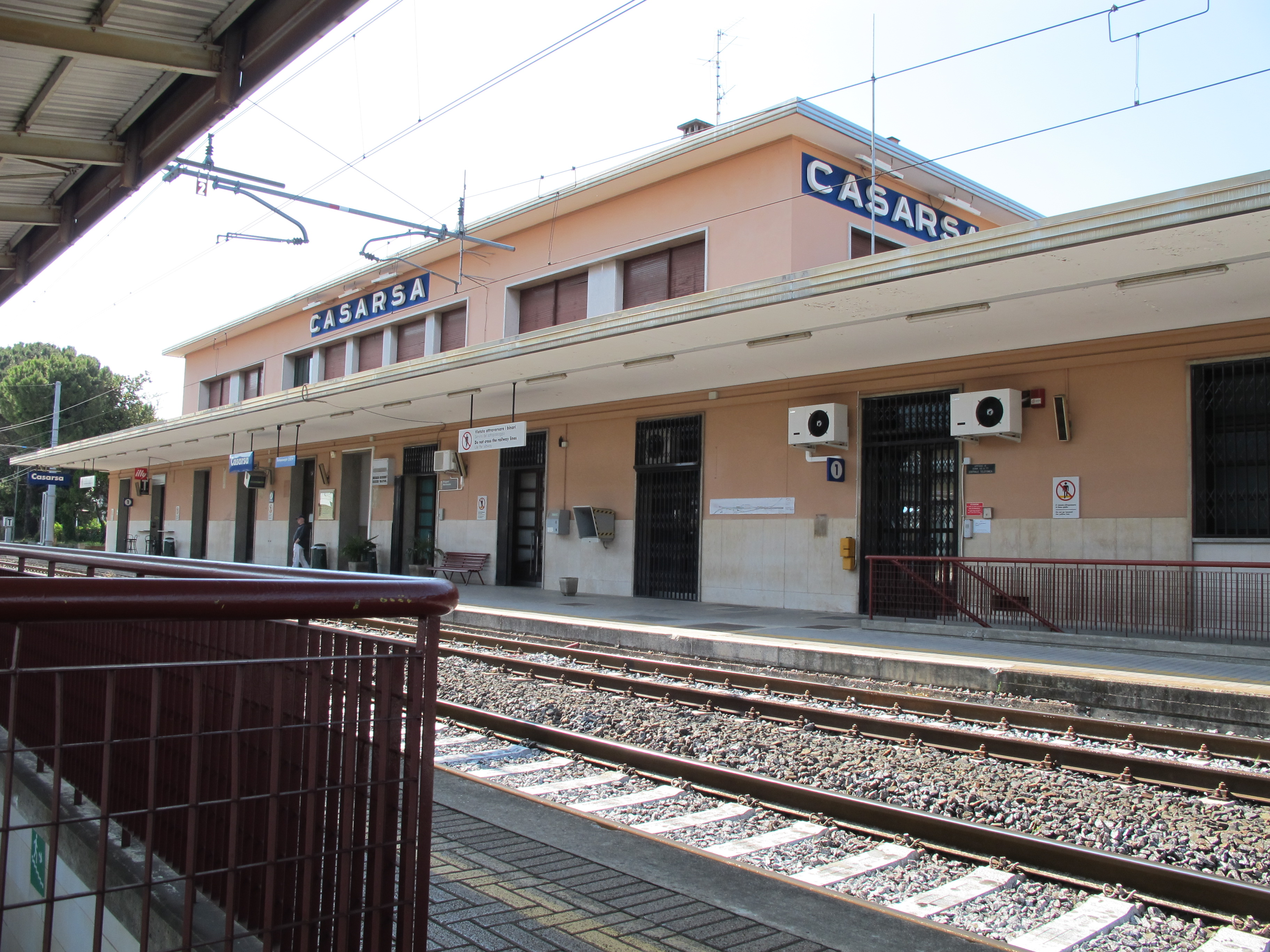 Stazione ferroviaria di Casarsa